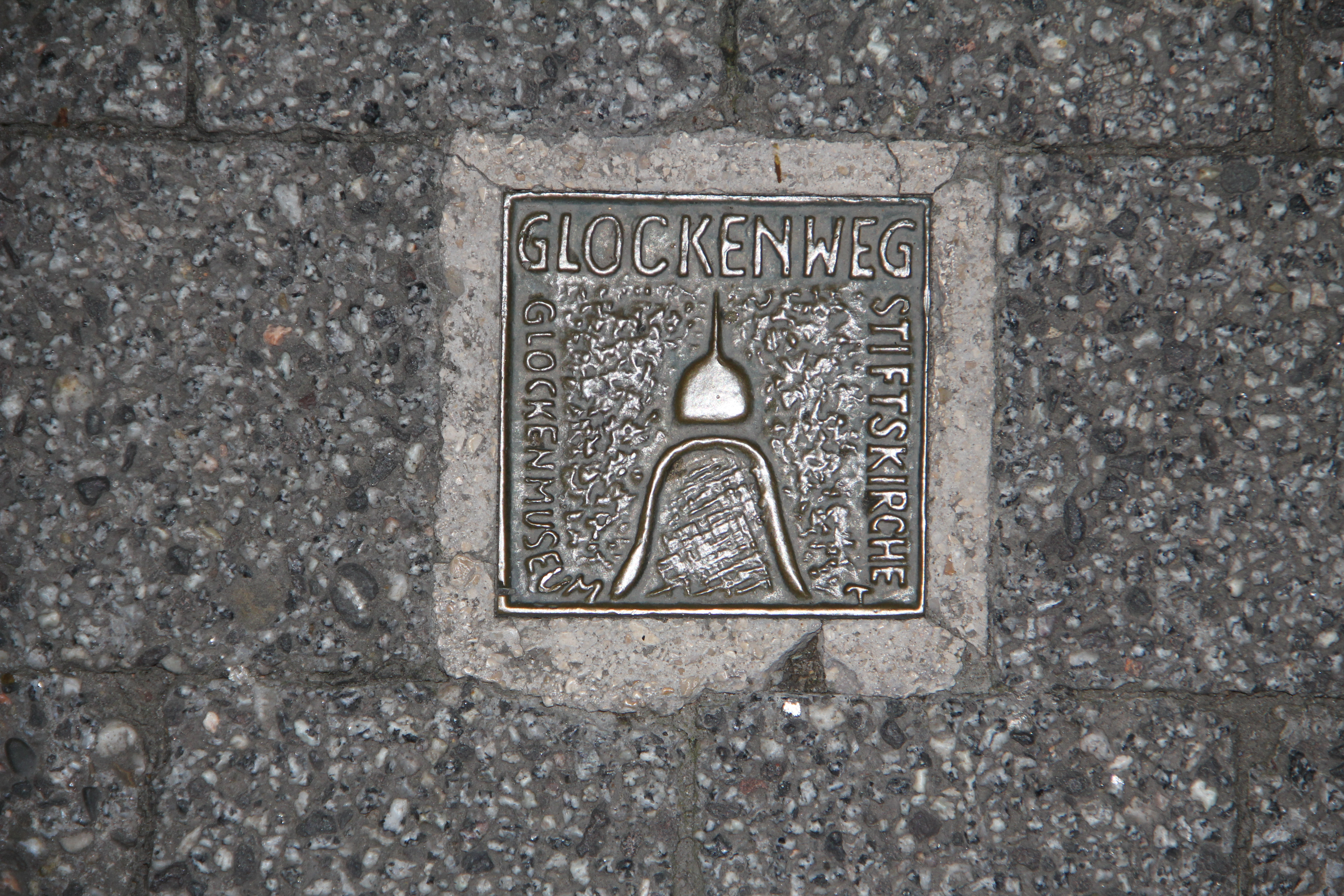 Eine der Wegmarken aus Glockenbronze des Glockenwegs in Herrenberg.